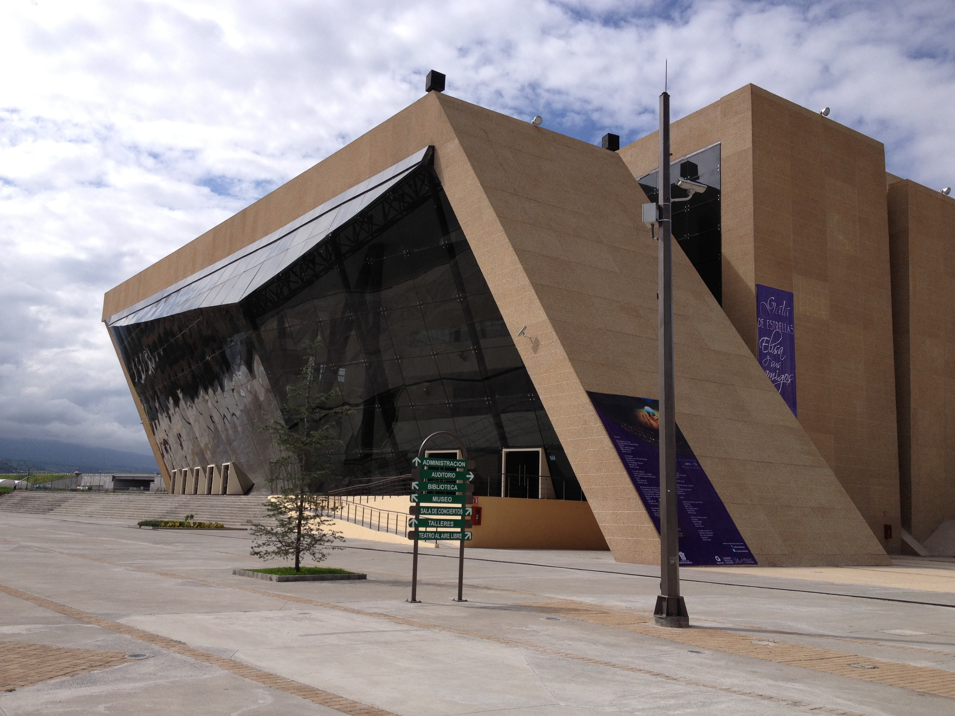 Sala de Conciertos "Elisa Carrillo" del Centro Cultural Mexiquense Bicentenario — Texcoco, Estado de México, México.